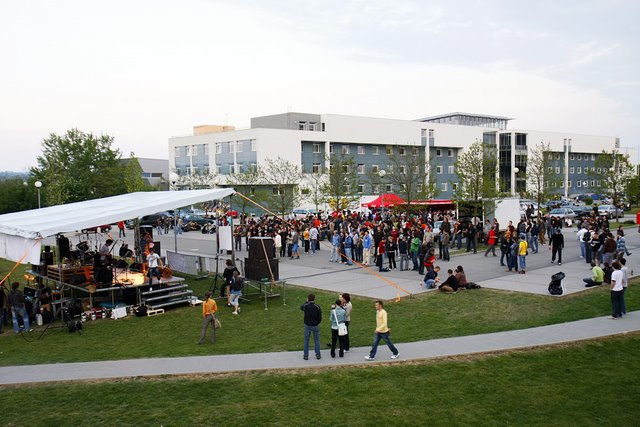 Hudební festival Hudba z FEKTu v roce 2009, v pozadí budova Fakulty elektrotechniky a komunikačních technologií a Fakulty podnikatelské